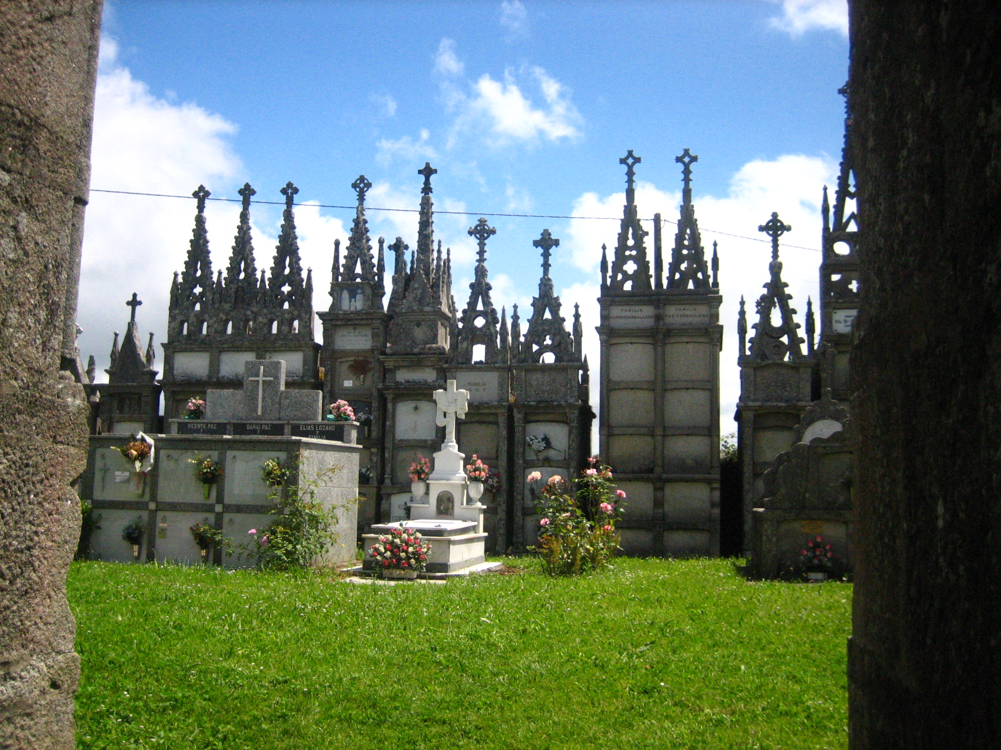 Cimeterio de Goiriz, Vilalba, Galiza